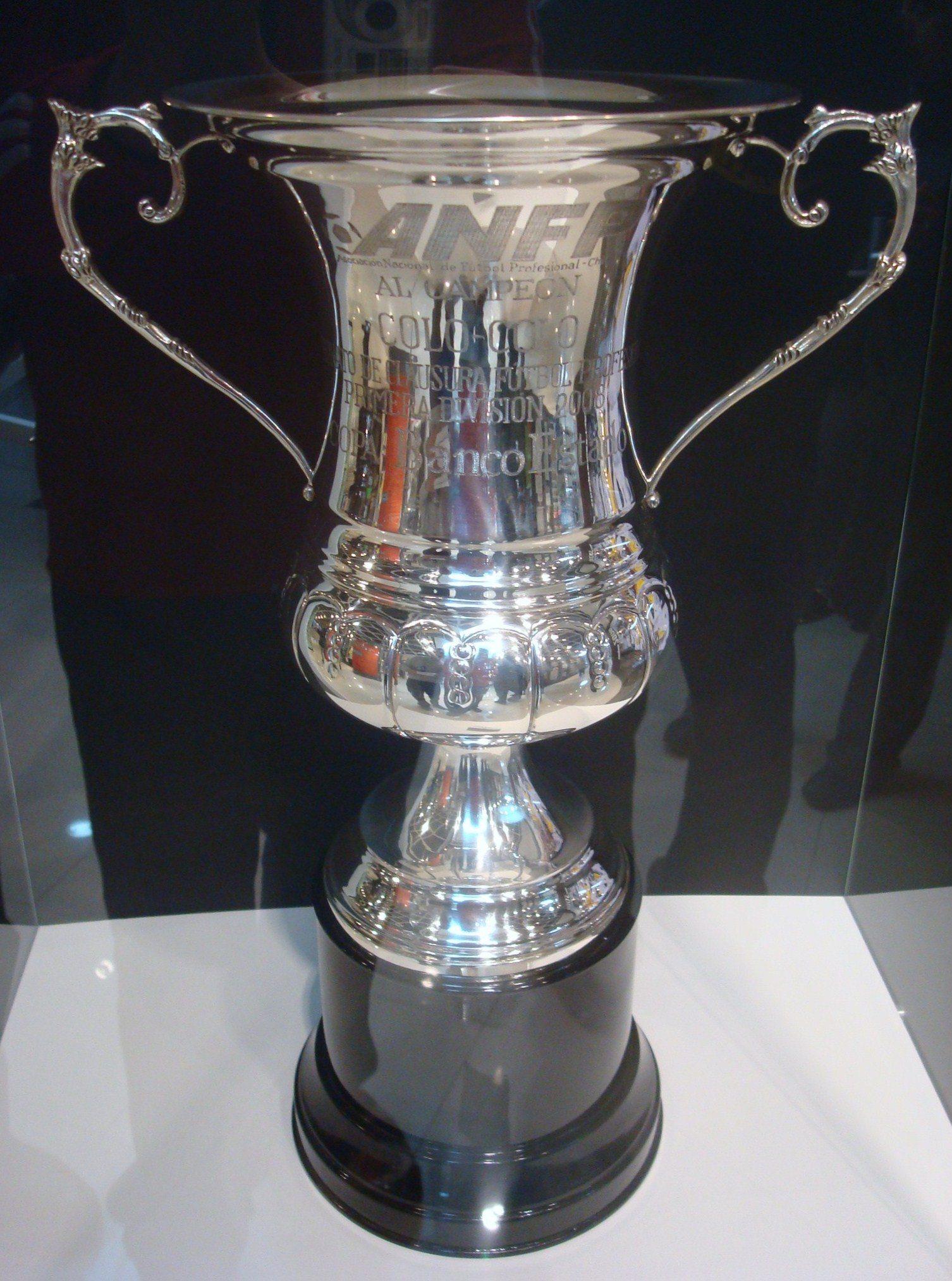 Copa del Clausura 2008 ganada por Colo-Colo